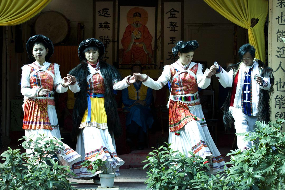 China